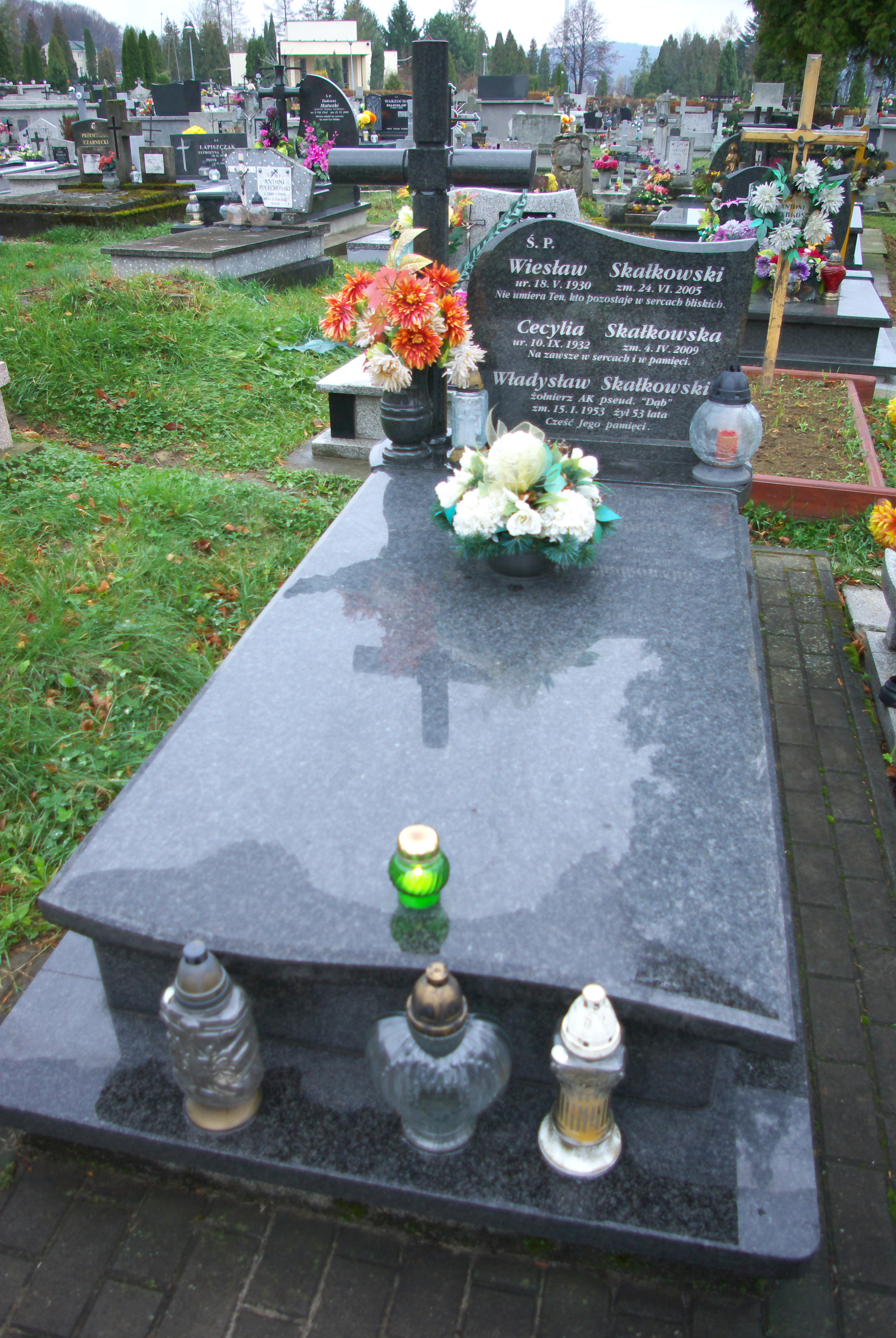 Grobowiec rodziny Skałkowskich na Cmentarzu Centralnym w Sanoku.